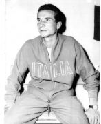 Chiara Curletto, immagine personale, Io, detentore del copyright su quest'opera, la rilascio nel pubblico dominio, foto di mio padre Mario Curletto.